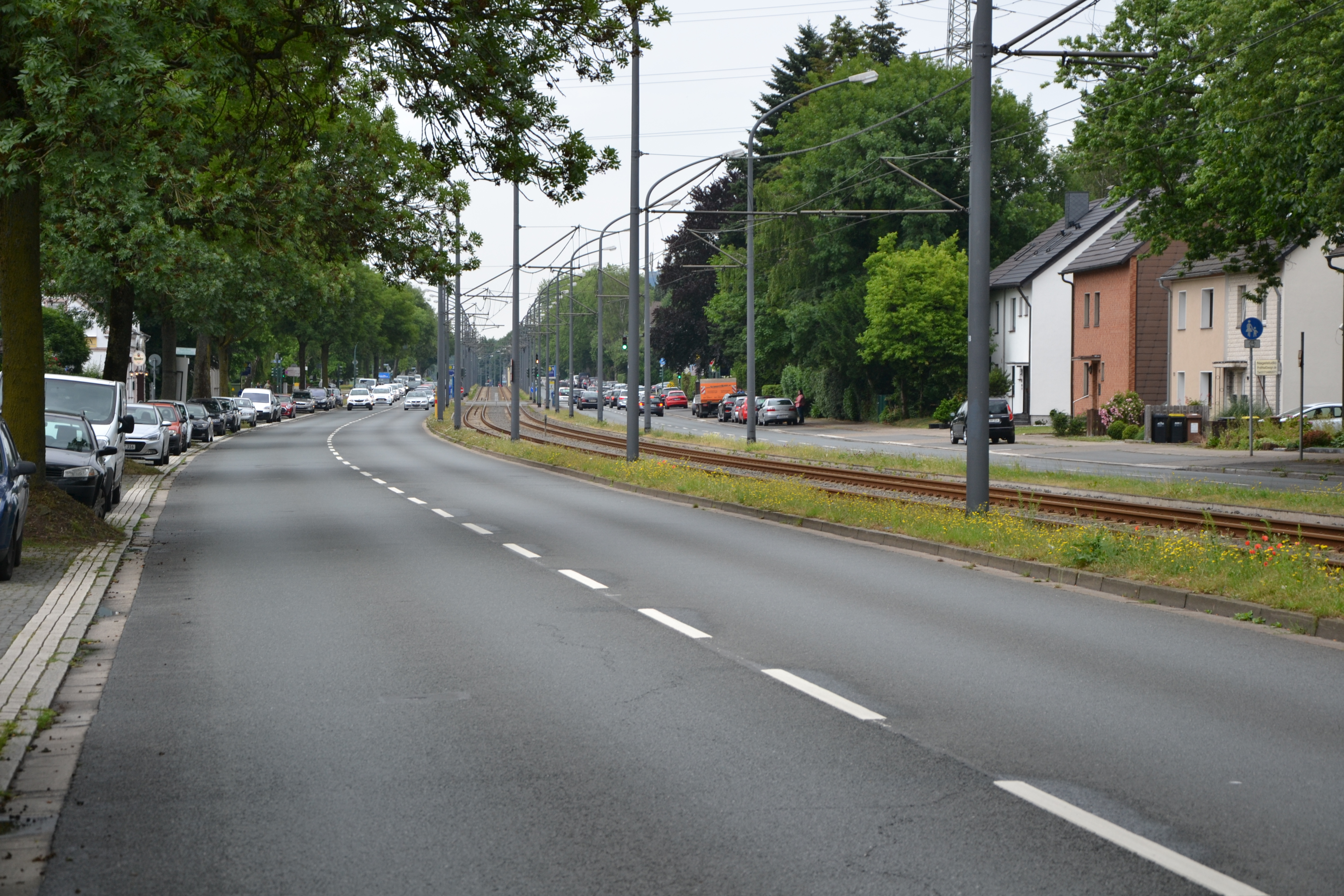 Essen-Bedingrade, Aktienstraße